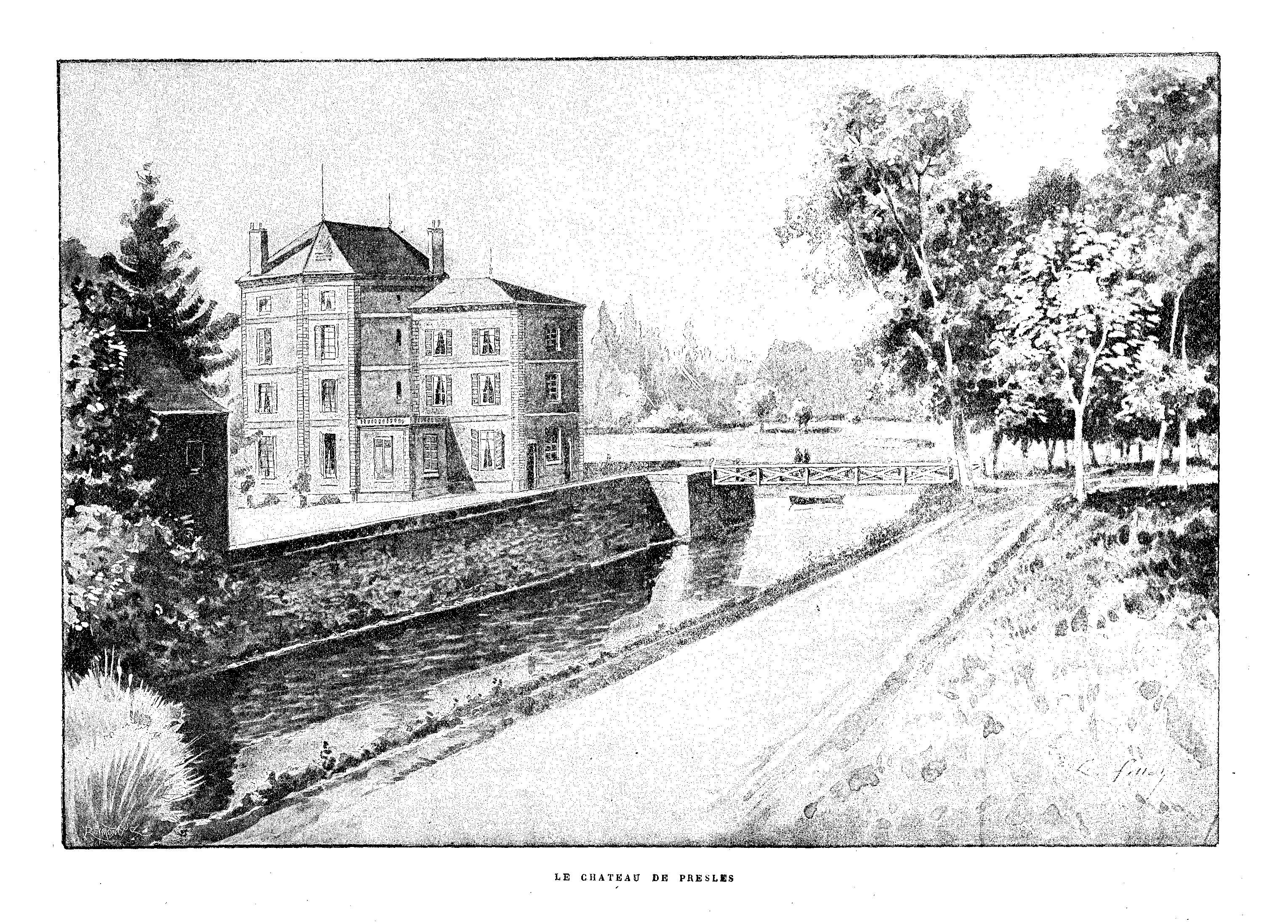 Château de Presles à Cerny (Essonne)